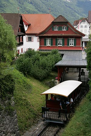 Stans: Talstation der Stanserhornbahn